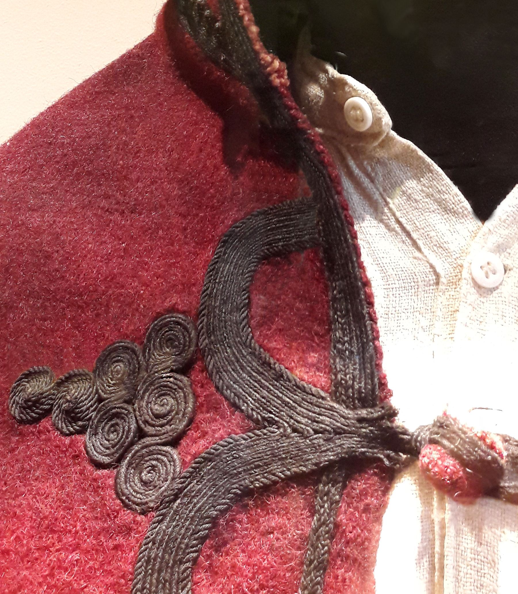 Motiv crnog gajrtana oprvažene crvene kabanice narodne nošnje izložene u sklopu stalne postavke Narodnog muzeja Kruševac